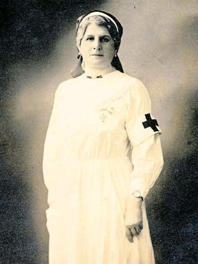 Hedwig Rosenbaumová (1864-1939), česká sportovkyně